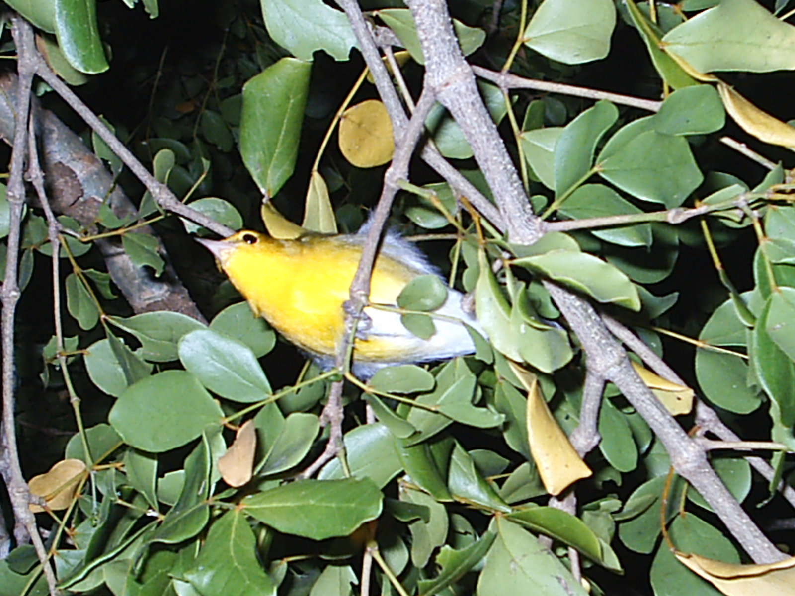 Alambrito